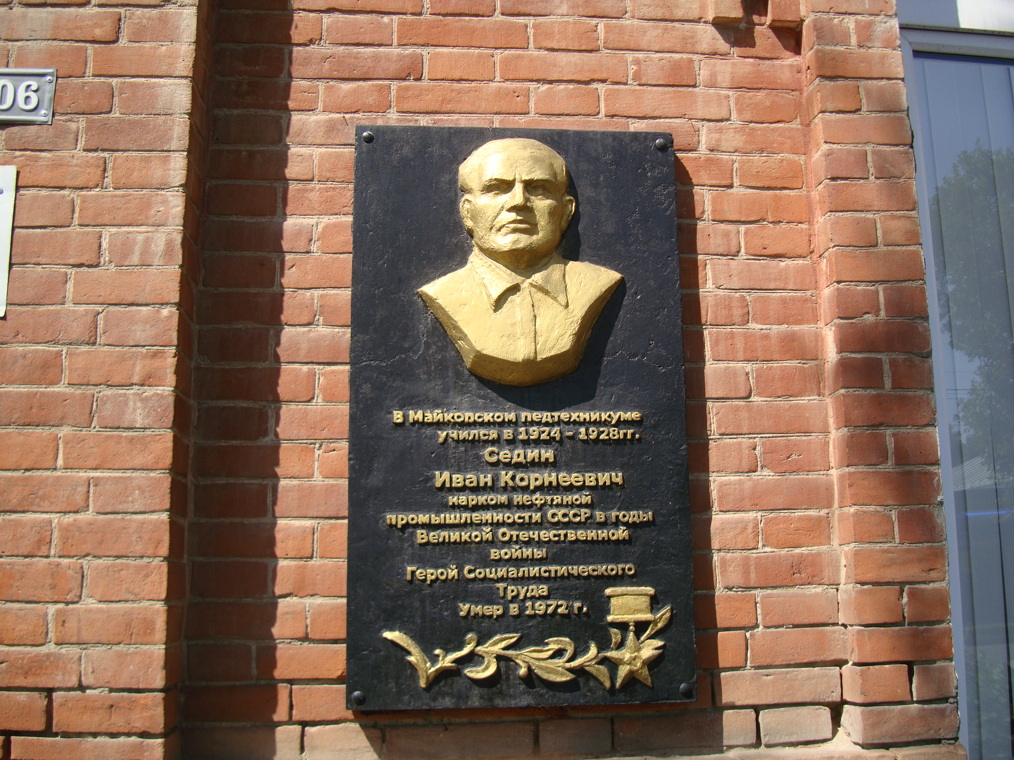 Седин Иван Корнеевич Герой Социалистичкского Труда